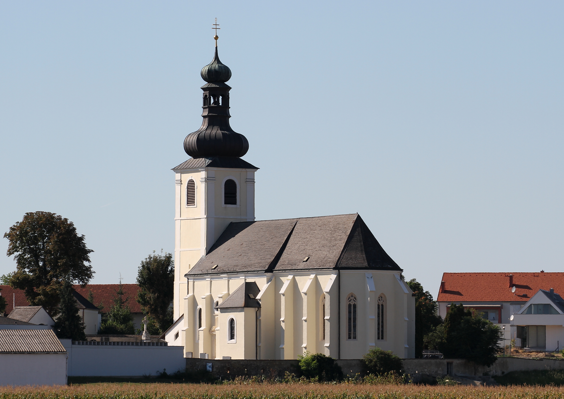 Die Pfarrkirche Mariä Himmelfahrt in der burgenländischen Gemeinde Unterfrauenhaid. Eine gotische Kirche, die 1660 barockisiert wurde.